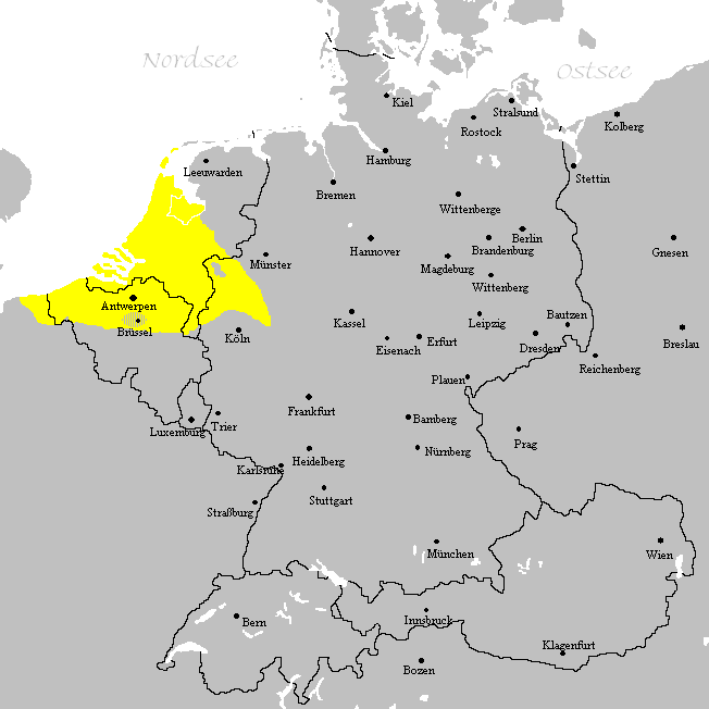 Verbreitungsgebiet der niederfränkischen Mundarten (Original text: Darstellungskarte mit dem Verbreitungsgebiet des Niederfränkischen.) erstellt am: 31. Dezember 2004